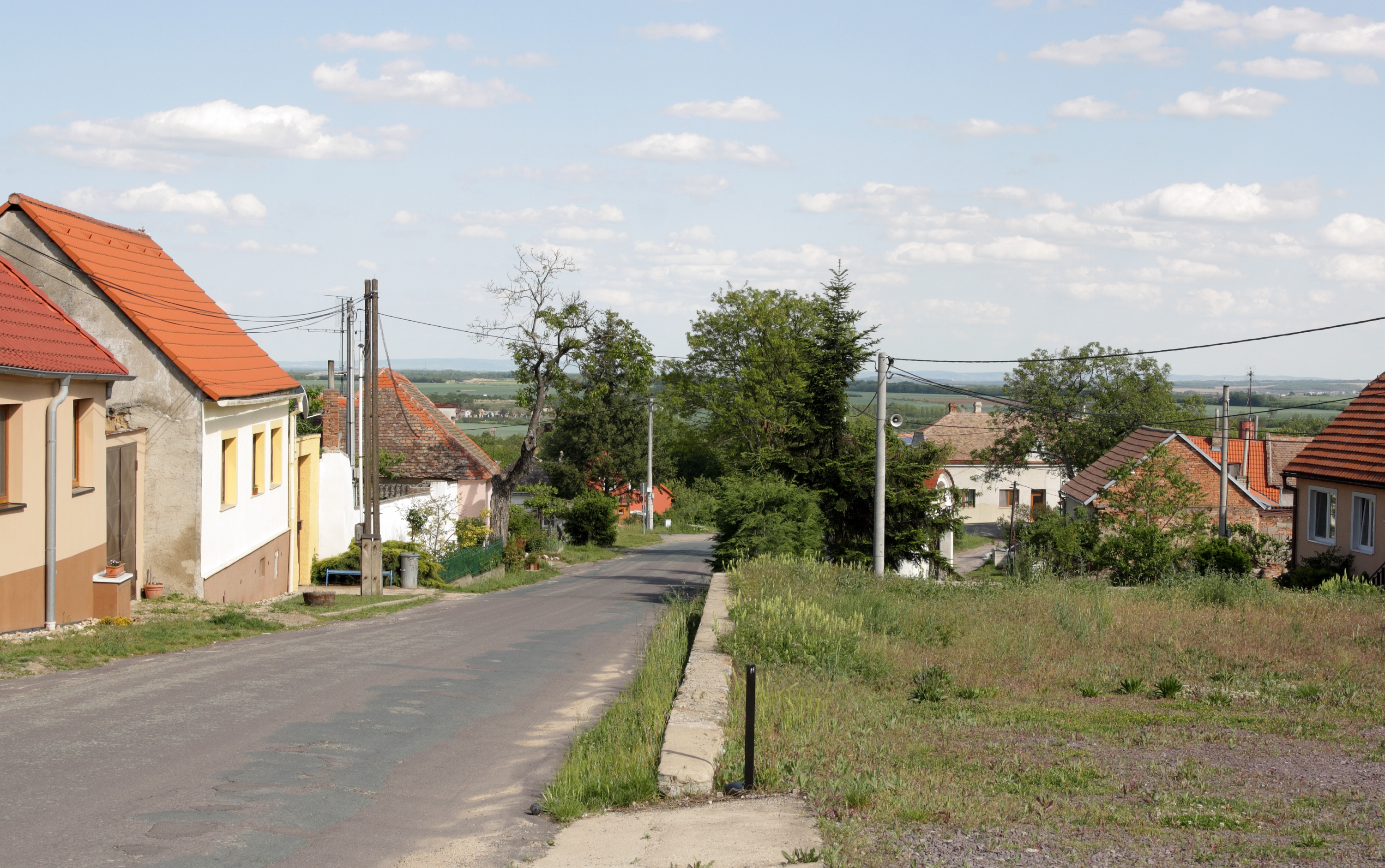 Konice (Znojmo) - náves, dolní konec.